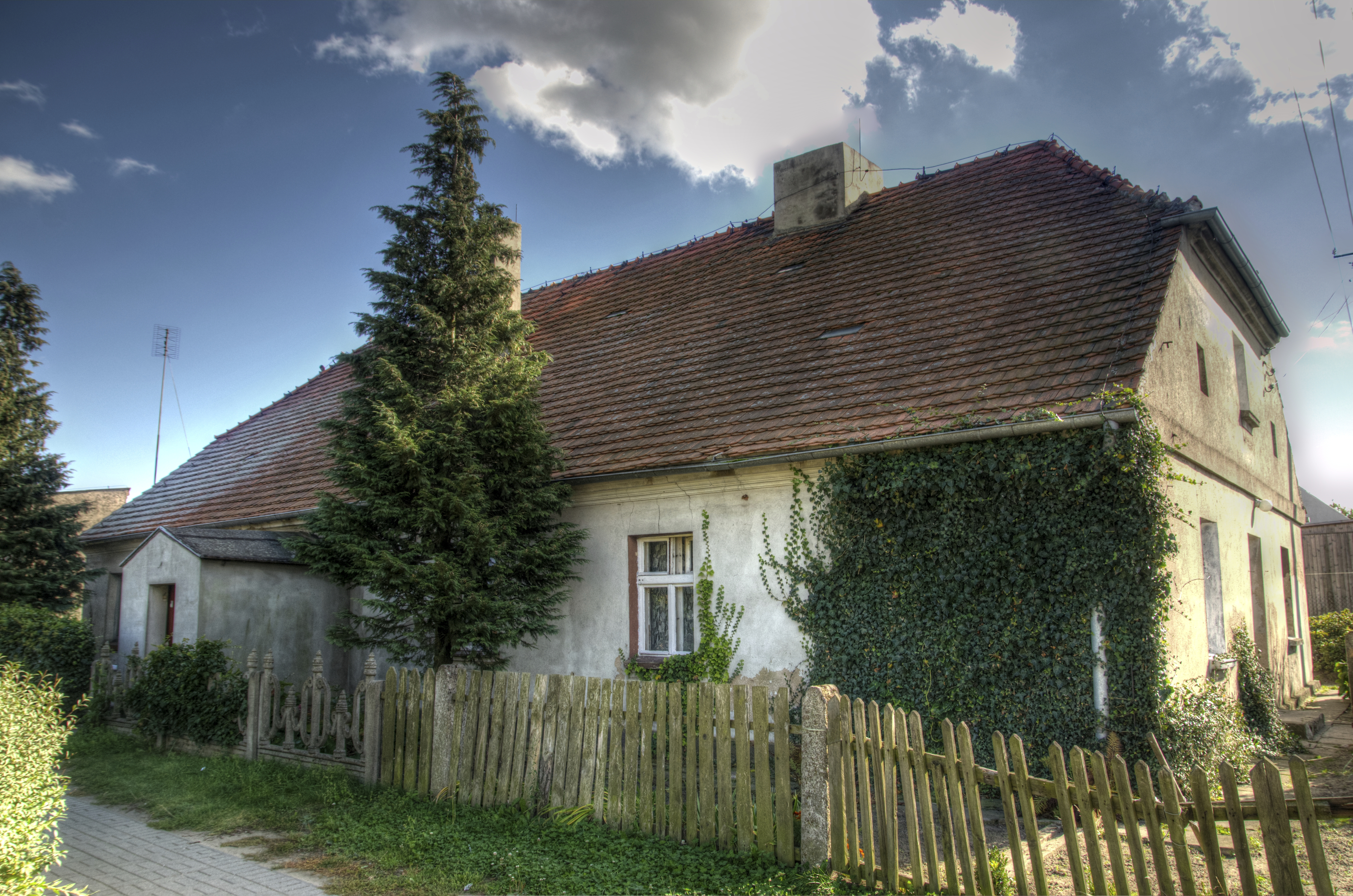 dawny szpital, obecnie dom nr 10 z 1. poł. XIX w. Pakosław, Lwówek